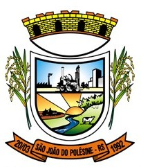 Brasão de Armas do município gaúcho de São João do Polêsine, Brasil.